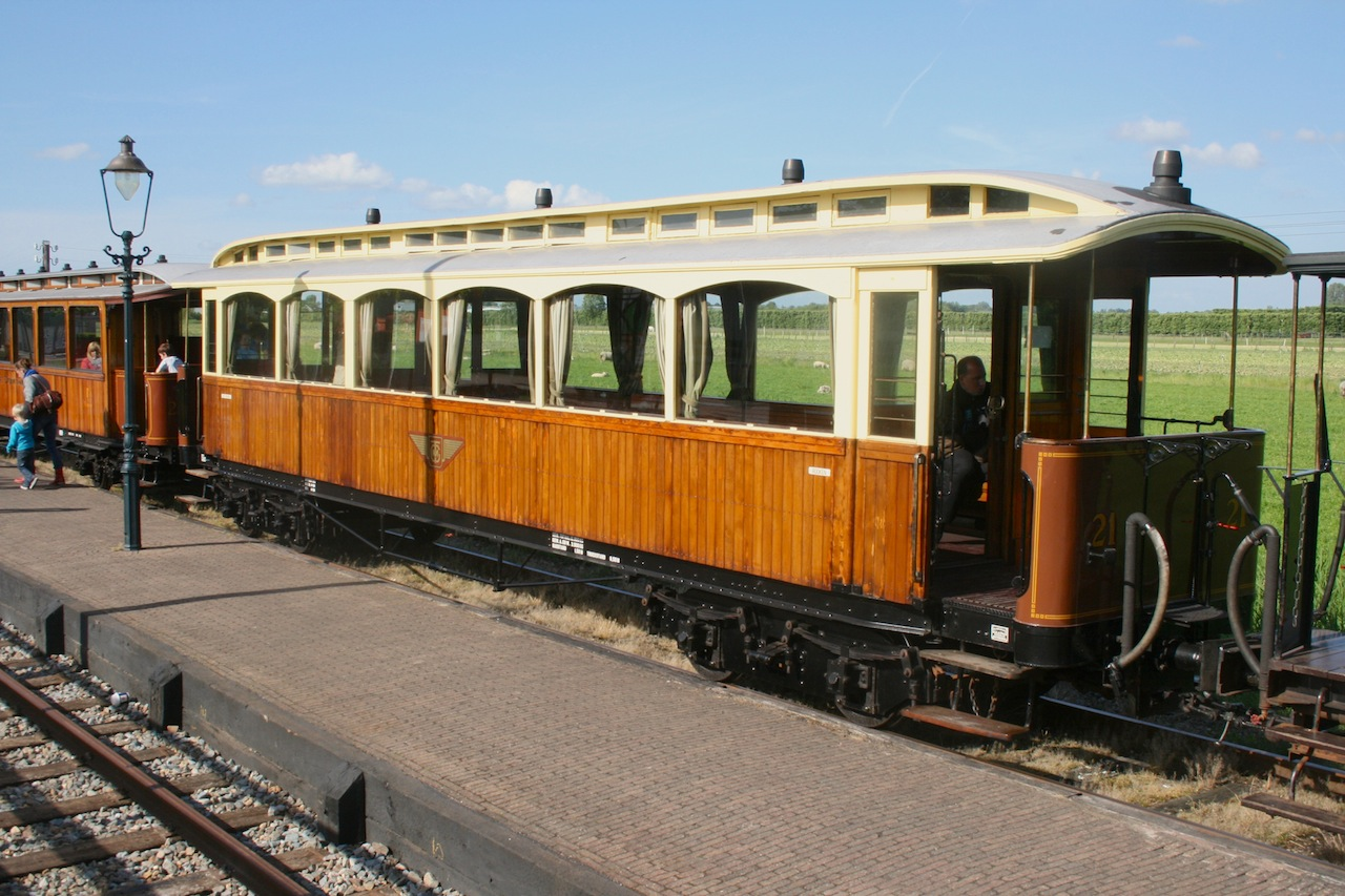 SHM rijtuig AB 21 van de Gooise Tramweg Maatschappij, te Wognum; 17 juni 2012. Foto: Erik Swierstra.